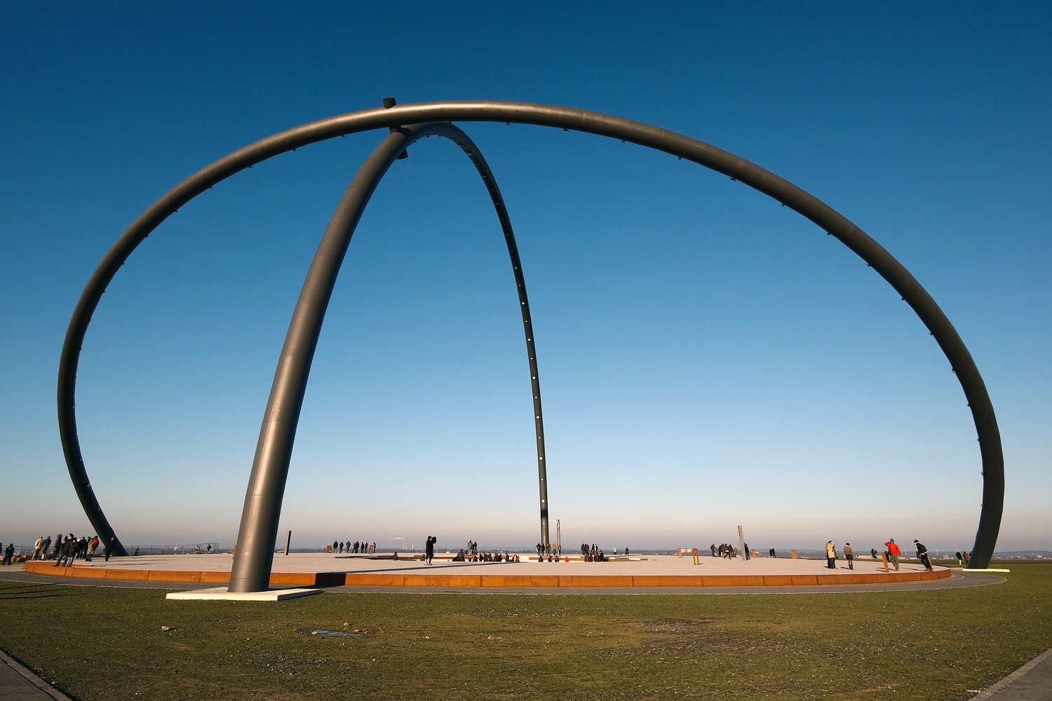 Route Industriekultur, Datum/Uhrzeit: 26.12.2008 13:21:18